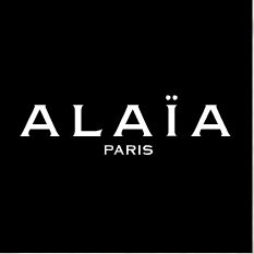 Azzedine Alaïa fashion house corporate logo